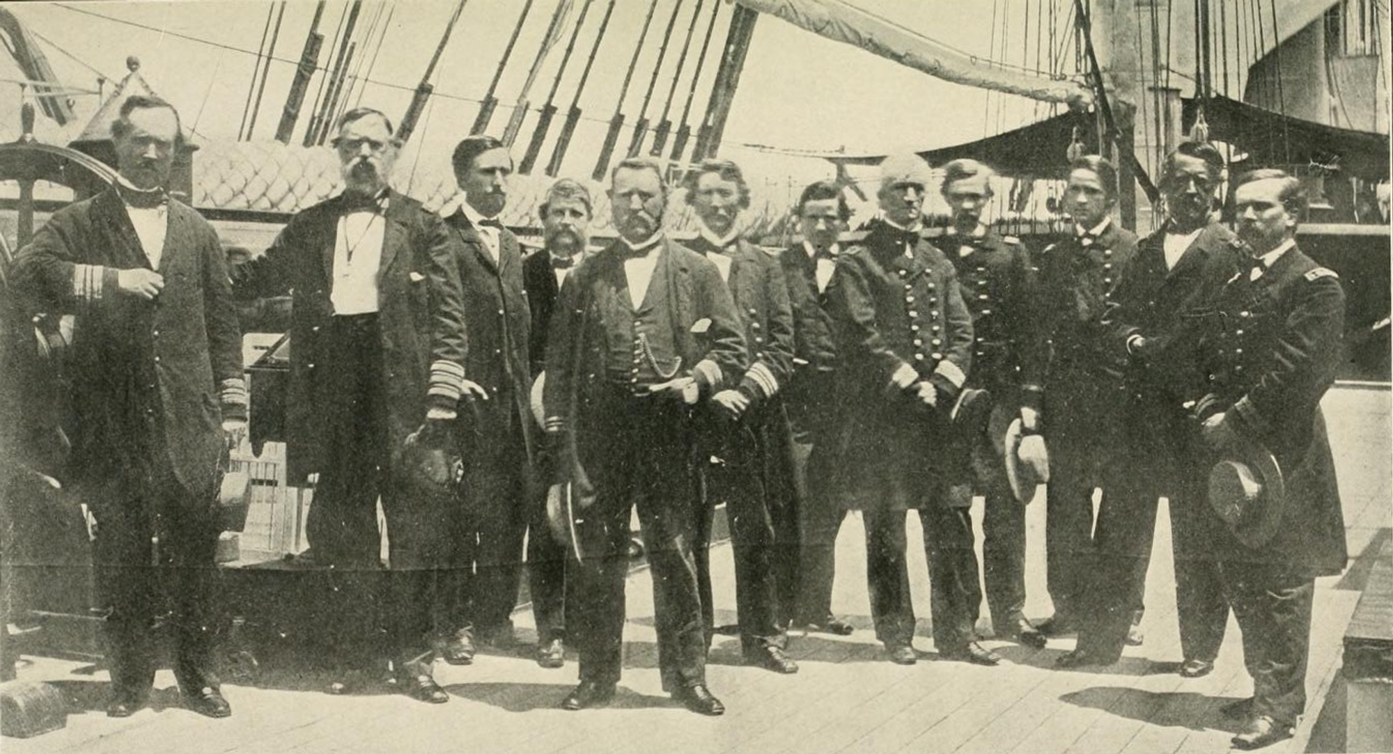 Rear Admiral Samuel Francis Du Pont & staff